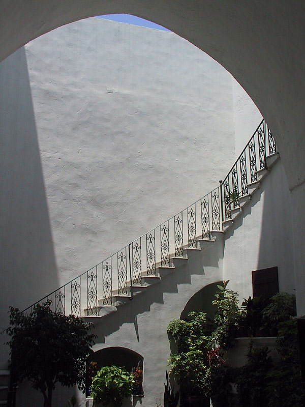 Der Innenhof des Hauses Abud in Akko, Israel, wo Baha'u'llah als Gefangener des osmanischen Reiches lebte. Das Haus zählt zu den Pilgerzielen der Baha'i-Religion. Hier entstand 1873 das „Heiligste Buch“ (Aqdas).